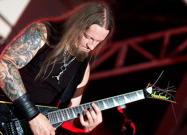 Helmut, guitarrista y vocalista de Belphegor.